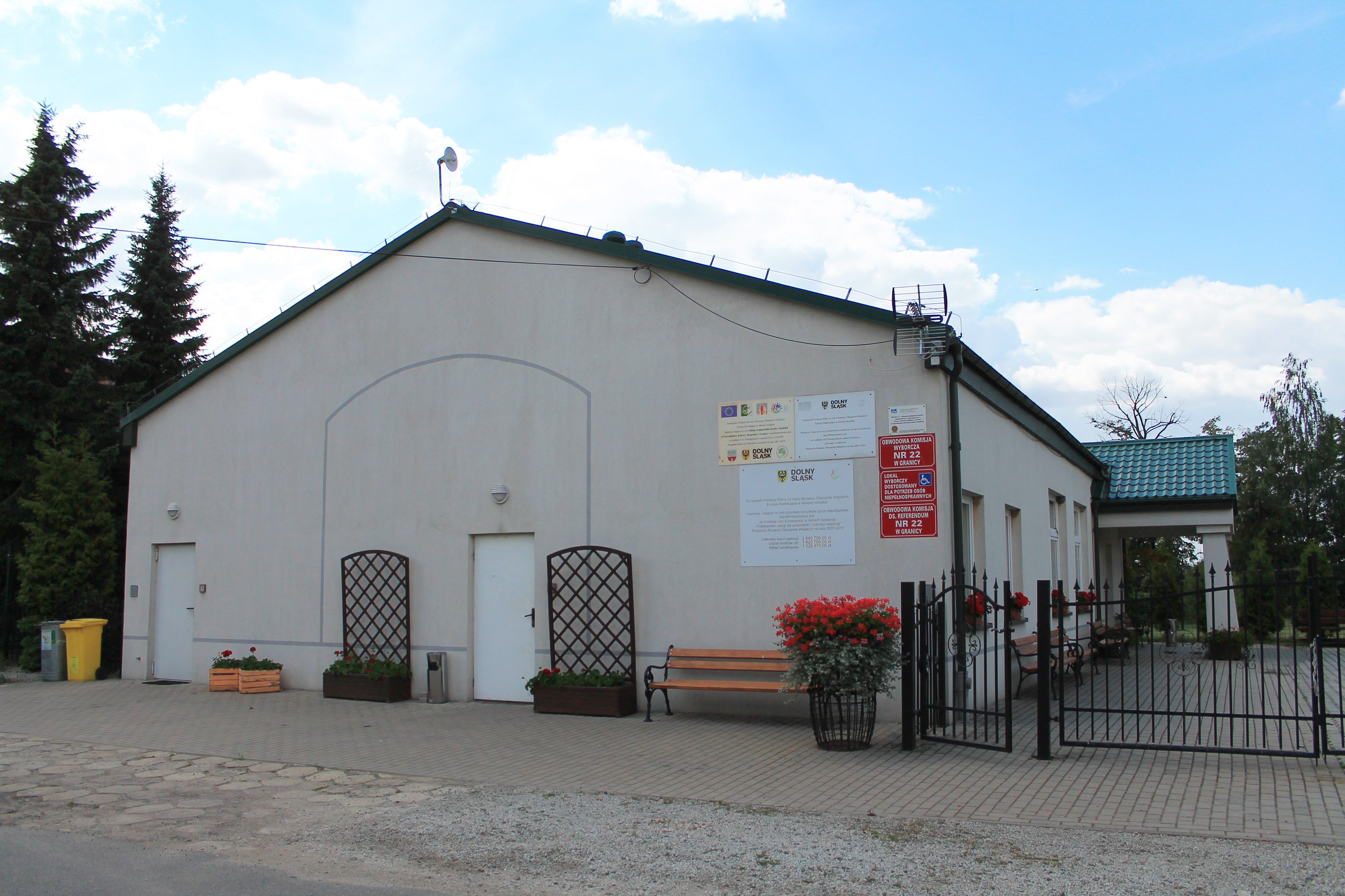 Granica, gmina Strzegom. Budynek świetlicy wiejskiej i Obwodowej Komisji Wyborczej nr 22.